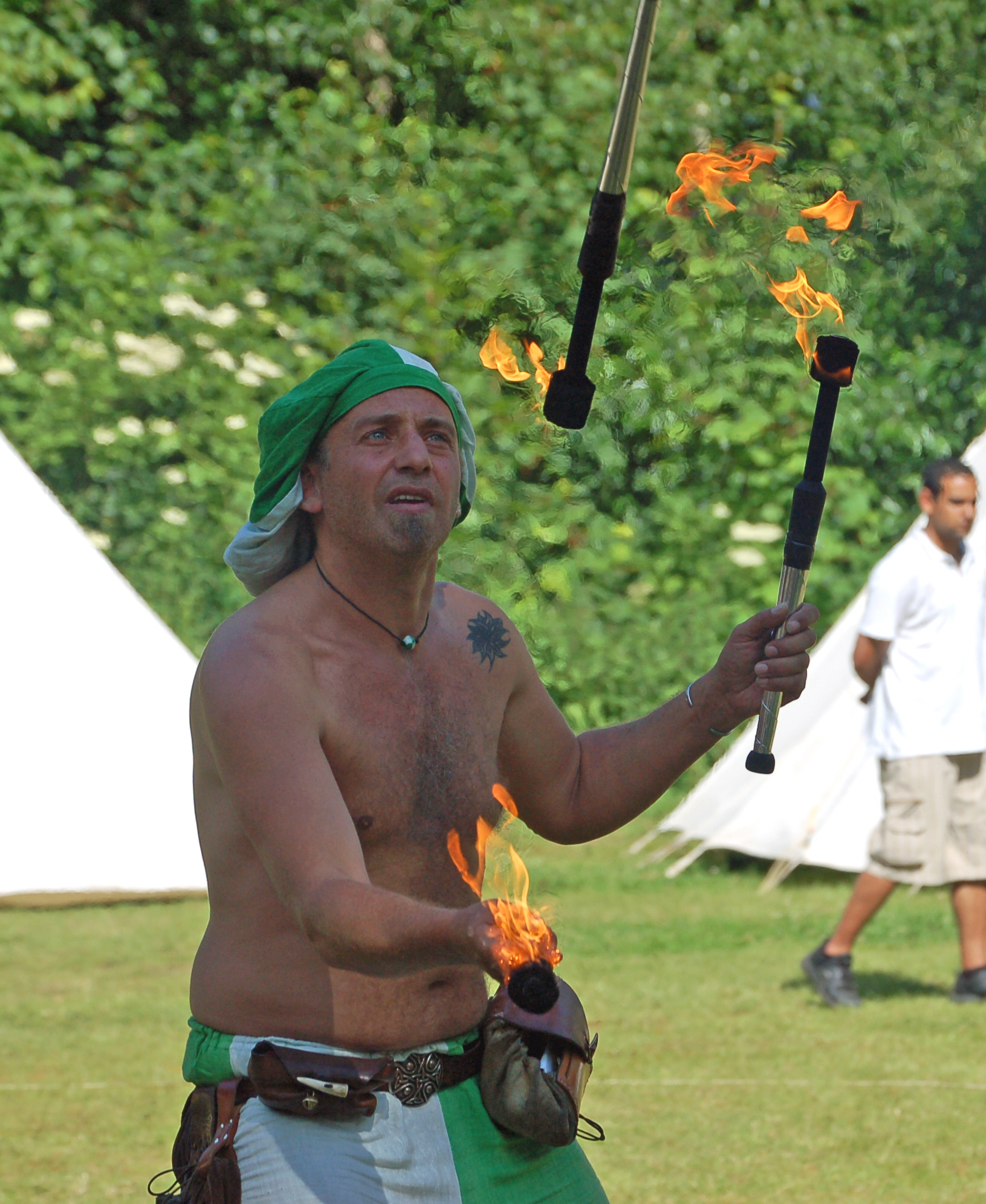 Gaukler beim Markttreyben zu Ueterst End auf dem historischen Burgplatz der ehemaligen Burg der Ritter von Barmstede auf dem Klostergelände